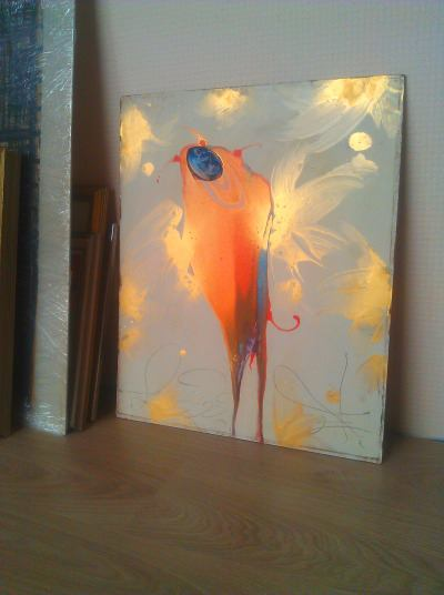 Ivara Zaikina glezna